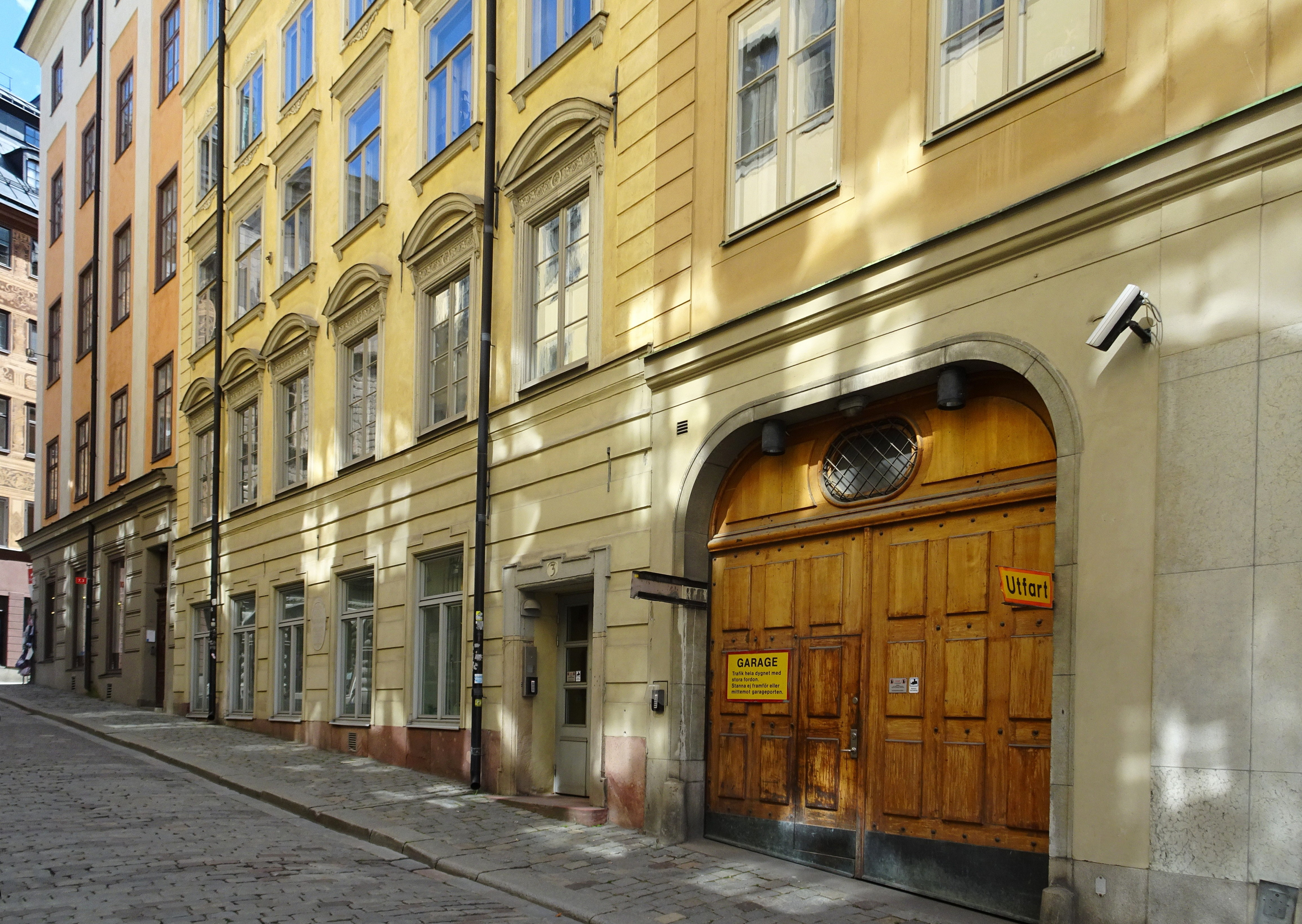 Salviigränd 1-3